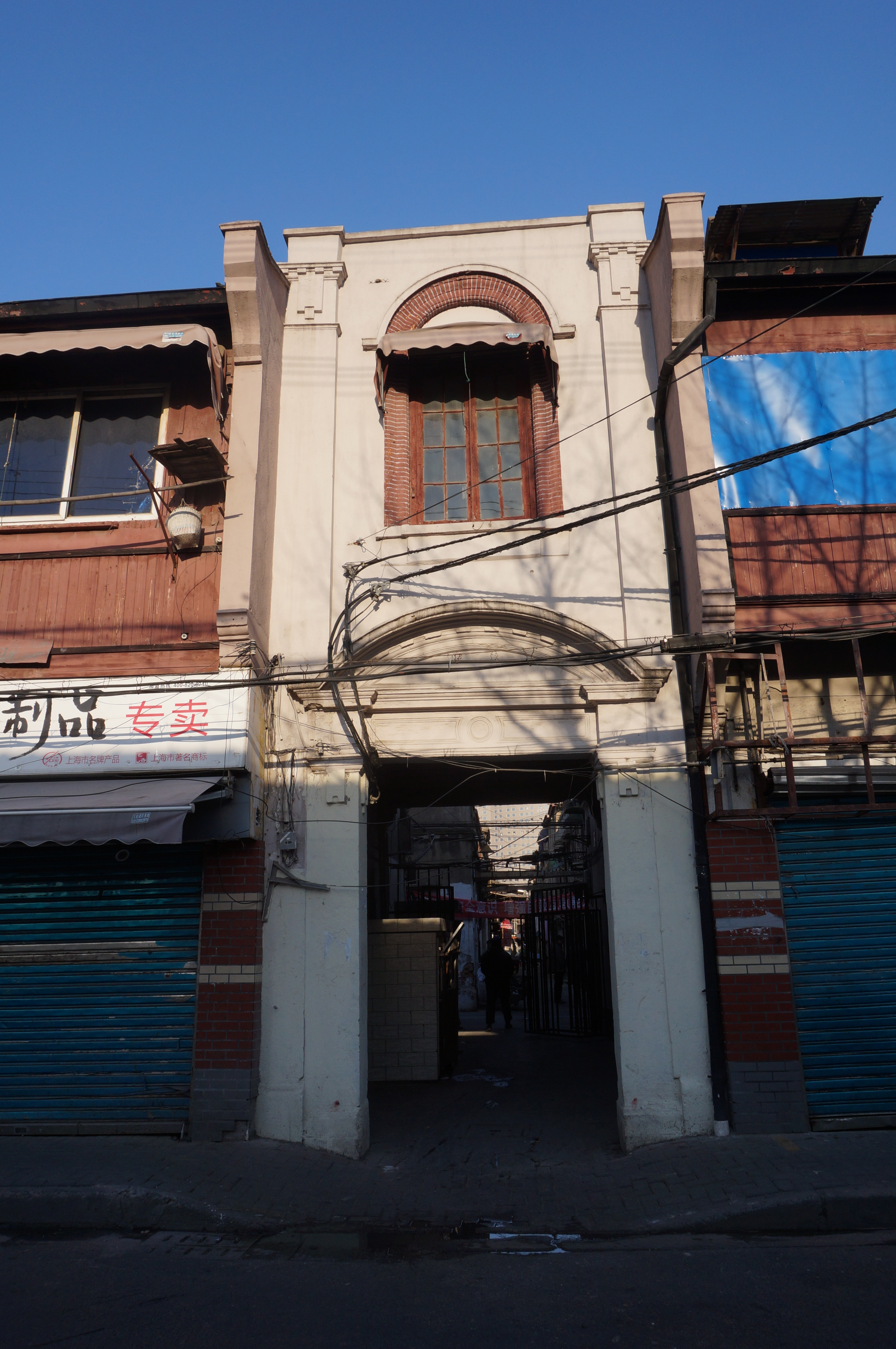 东斯文里东街入口